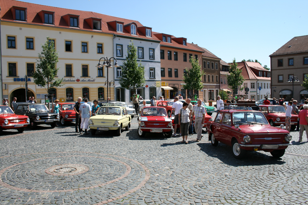 Radeberg, Markt: Saporoschez-Treffen